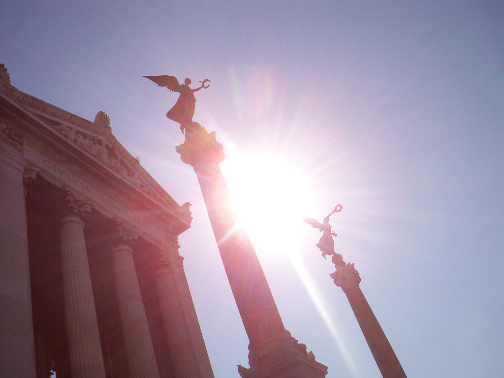 Monumento al soldado desconocido (Roma)